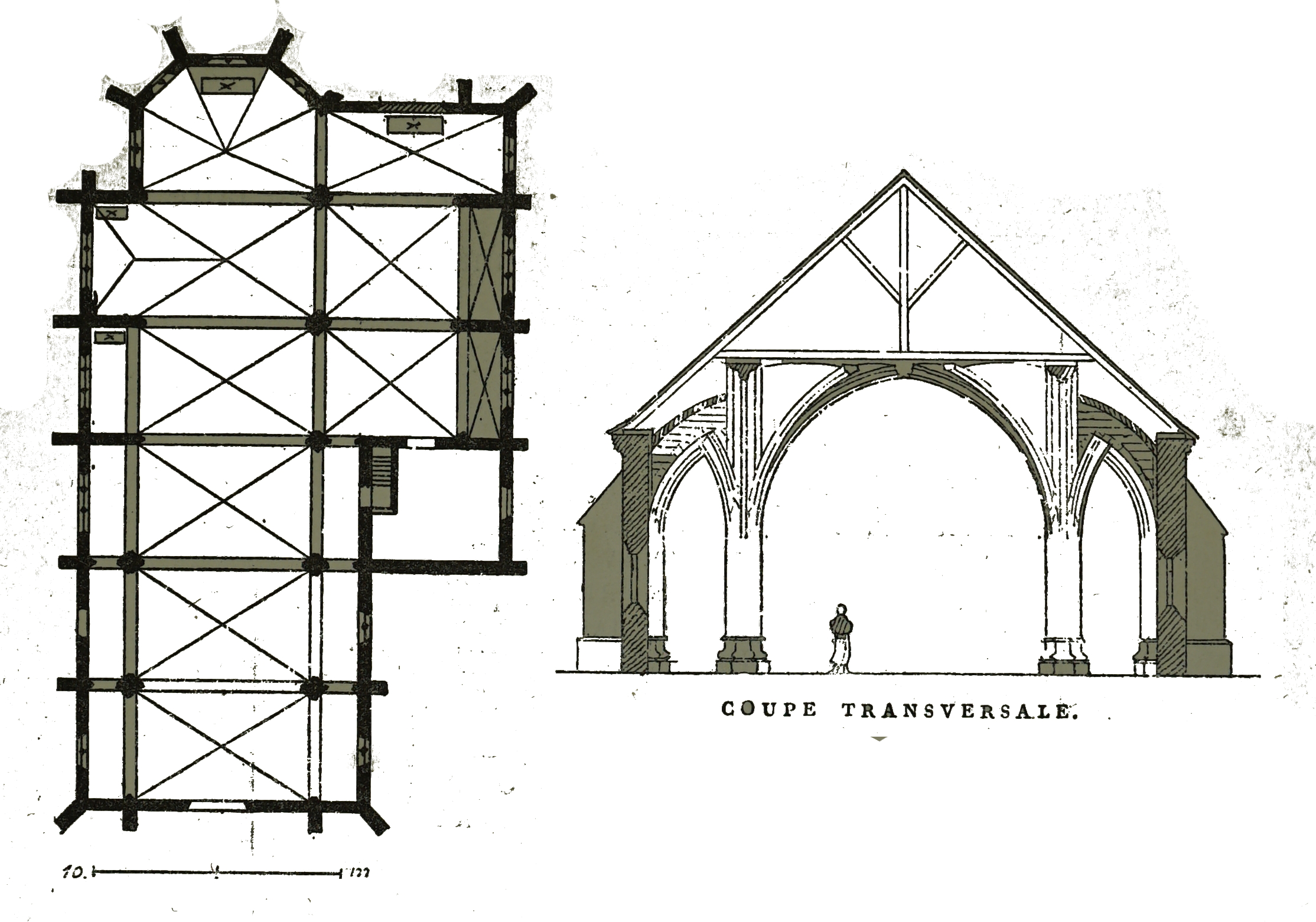 par un dessin de Fichot.